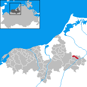 Gnewitz in Mecklenburg-Western Pomerania - District Bad Doberan